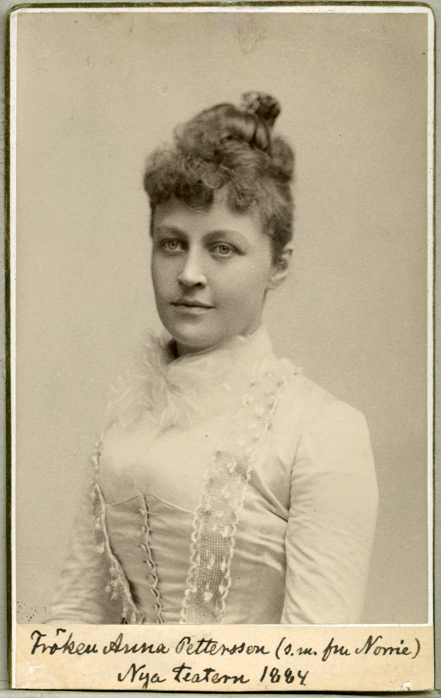 Anna Norrie (f. Pettersson), skådespelare vid Nya teatern